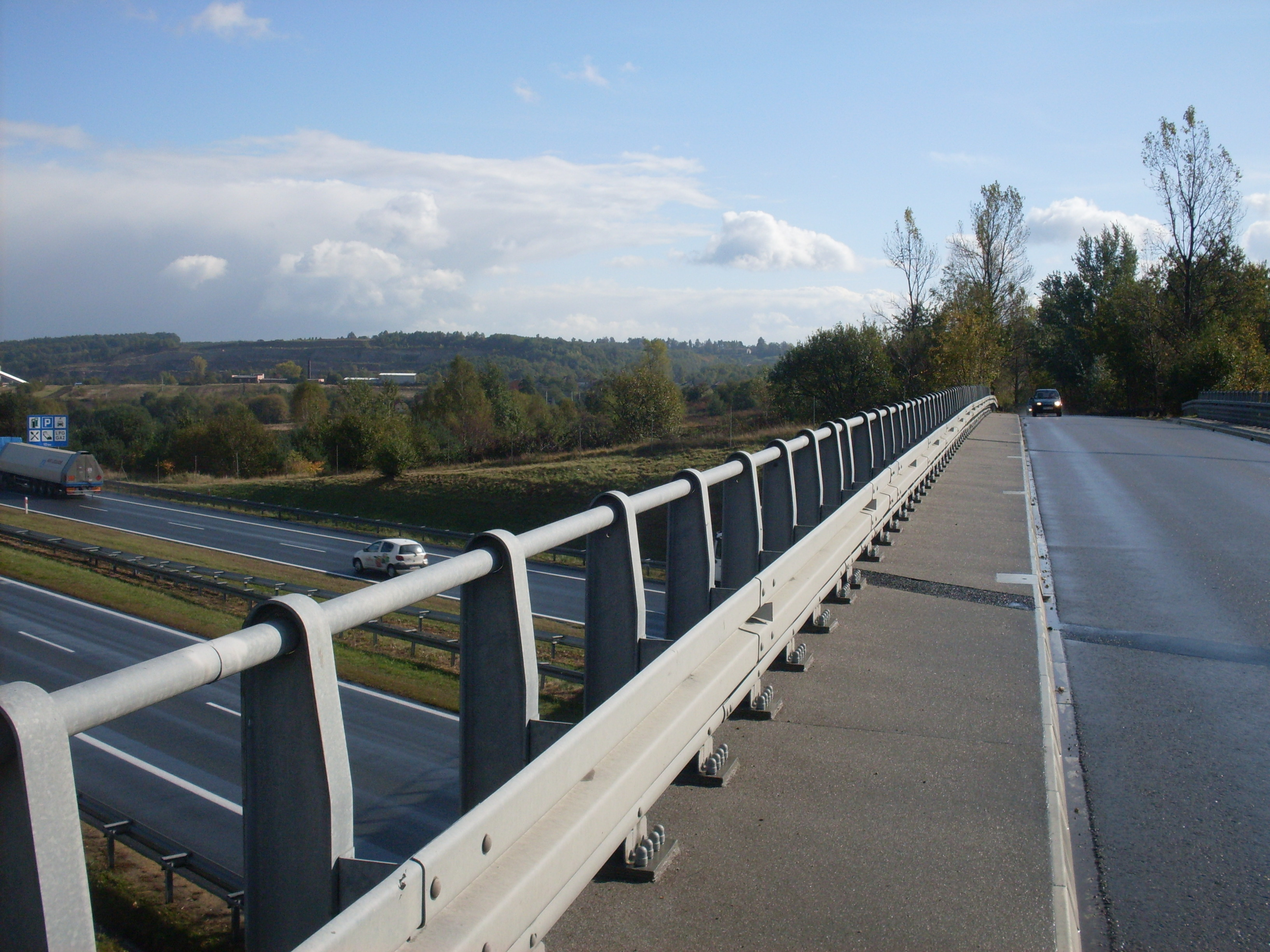 Zalas. Wiadukt nad A4